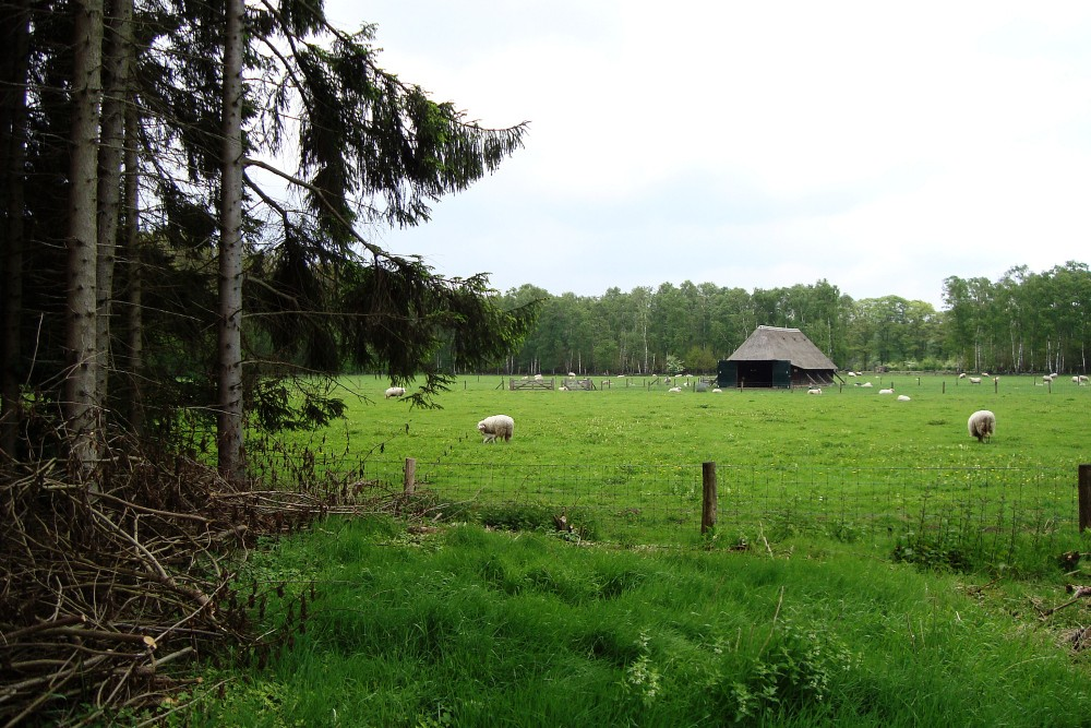 schaapskooi met kudde op landgoed Westerheide, Mariënborn, Arnhem